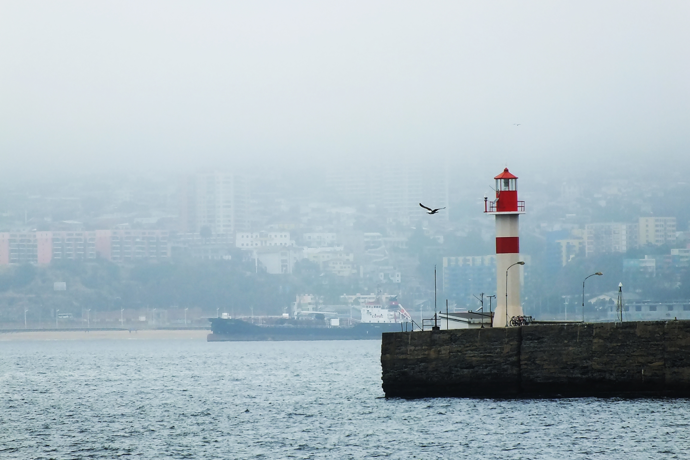 EL farol de valparaíso en un día de invierno.